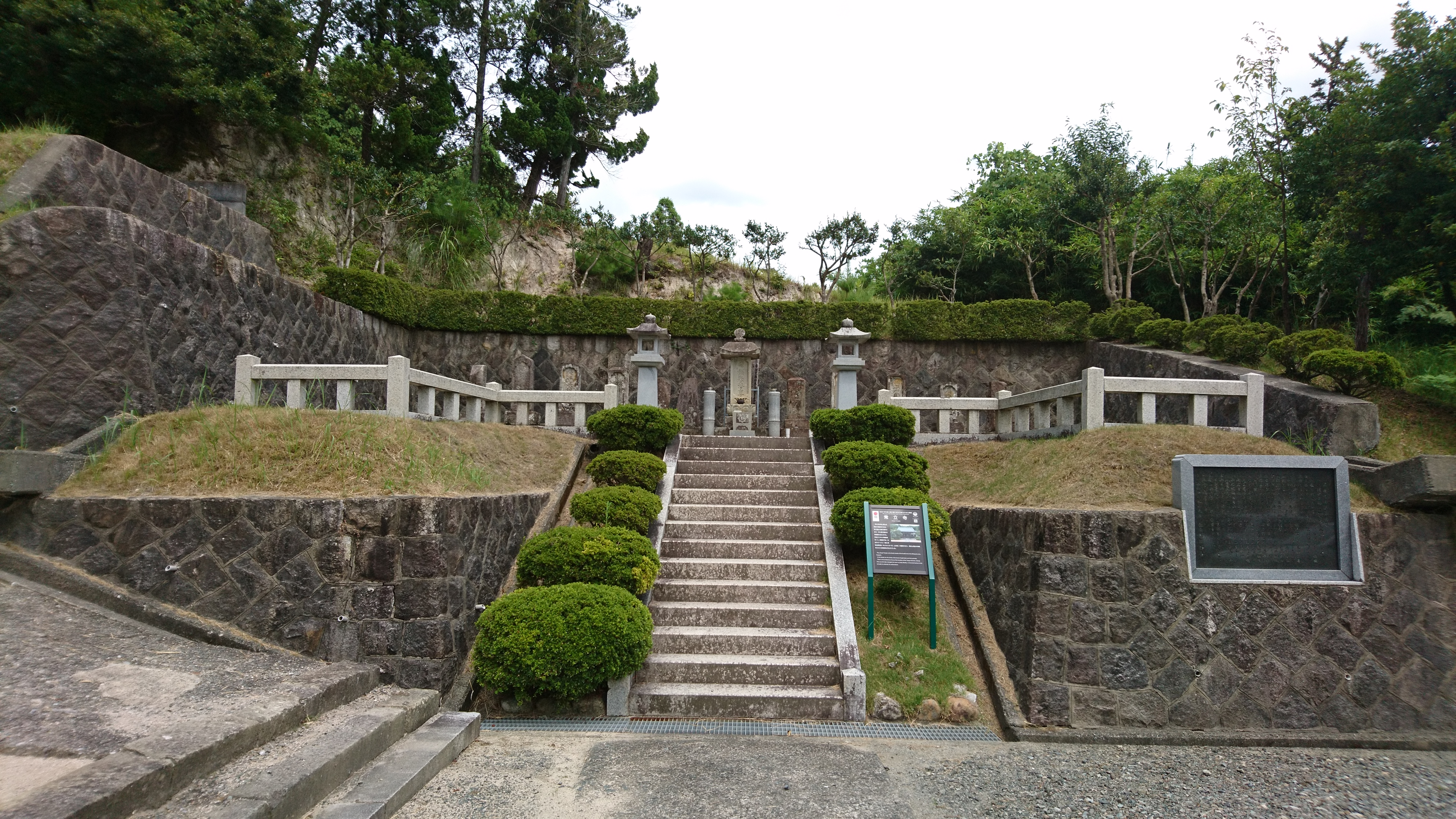 常立寺（京丹後市峰山）にある森田森田治郎兵衛の墓碑。毎年5月に始祖慰霊祭が行われる。